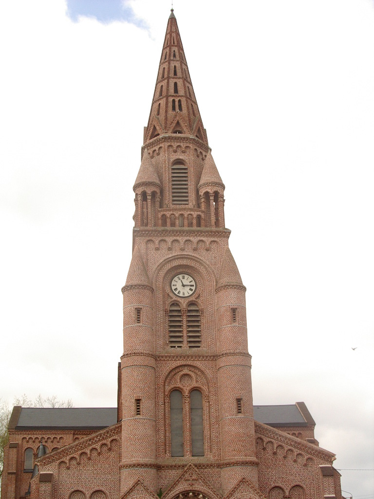 Eglise Saint Barthélémy Oignies